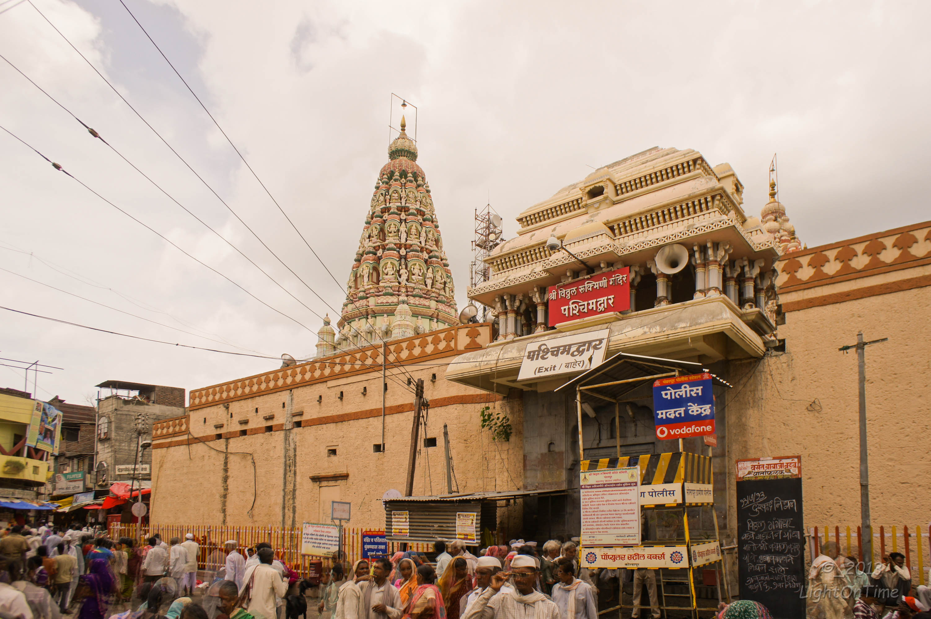 Pandharpur_2013_Aashad